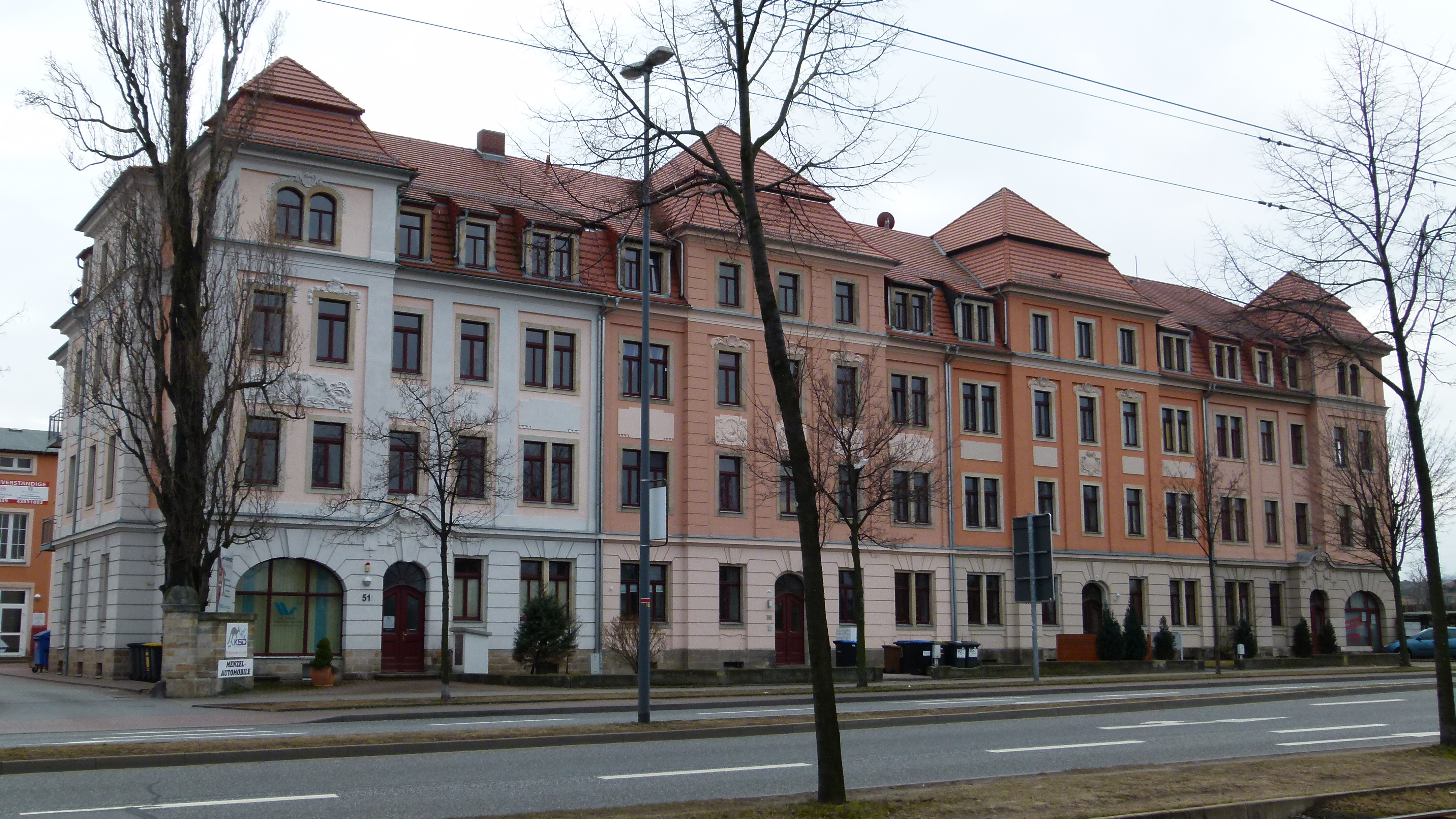 Denkmalgeschütztes Gebäude, Fröbelstraße 51-53-55-57, Friedrichstadt, Dresden